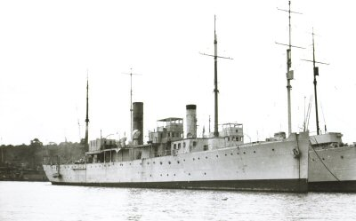 HMS BRYONY